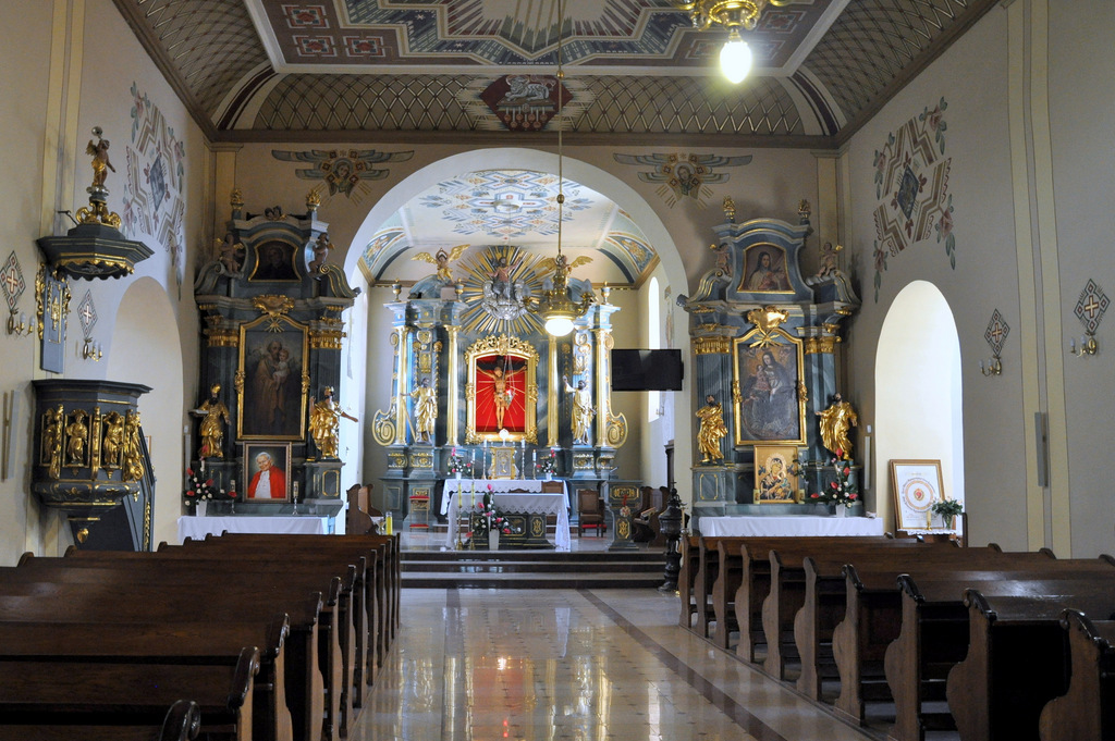 Kościół p.w. Podwyższenia Krzyża Świętego w Zwoleniu z XVI w. - nawa główna.